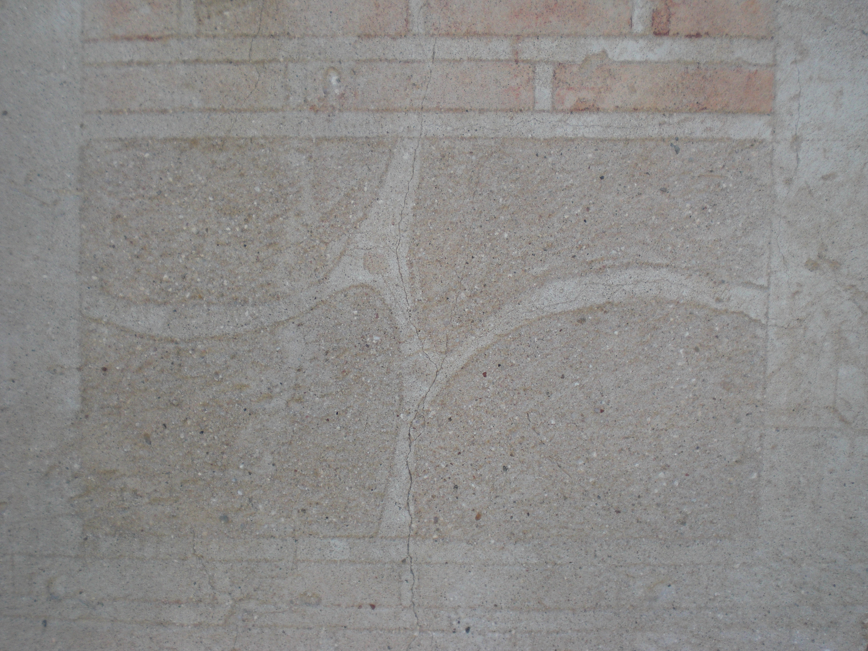 Uno de los esgrafiados que se encuentran en las ruina de Bernuy (Marugán).